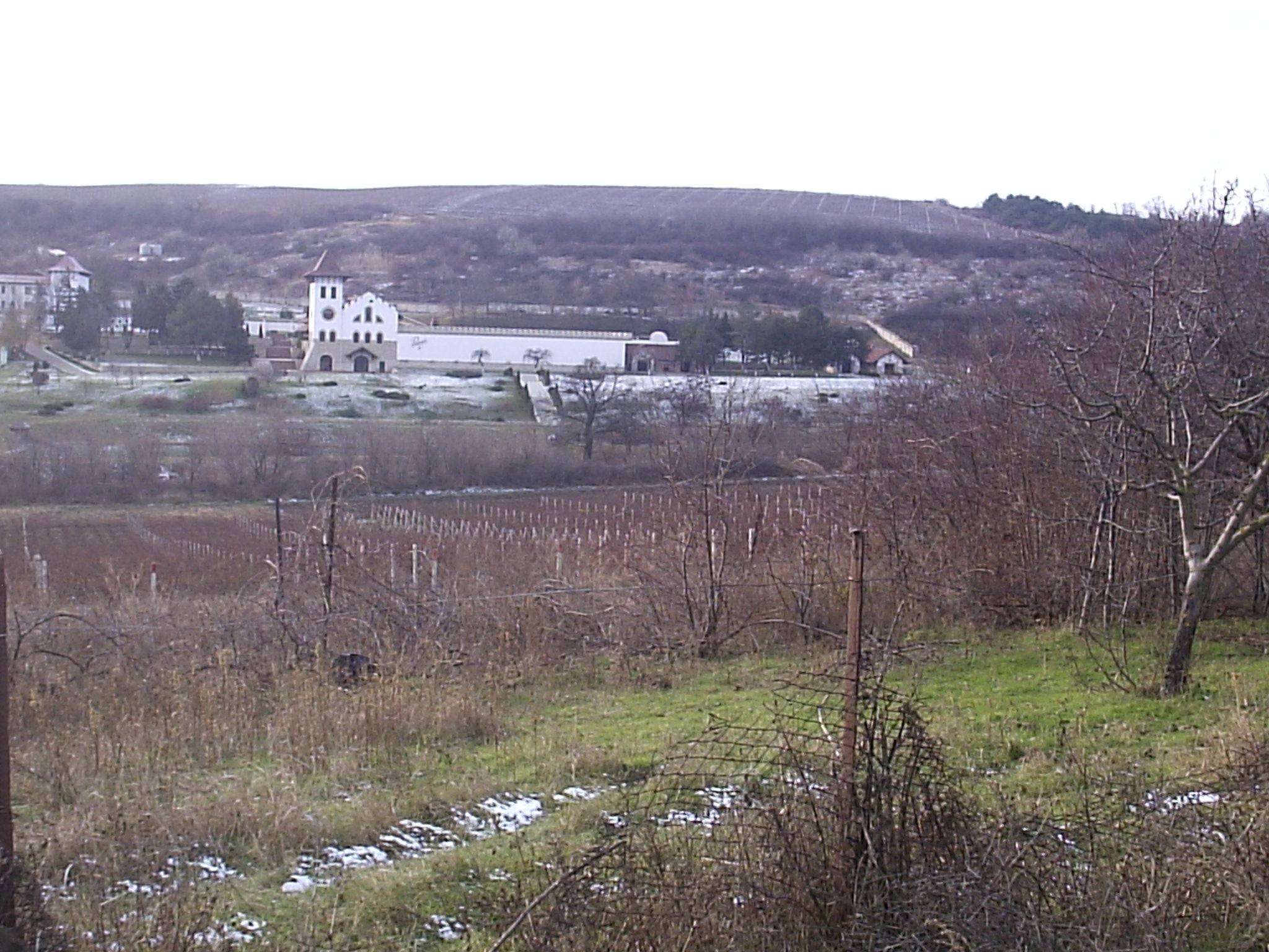 Fabrica de vin Purcari